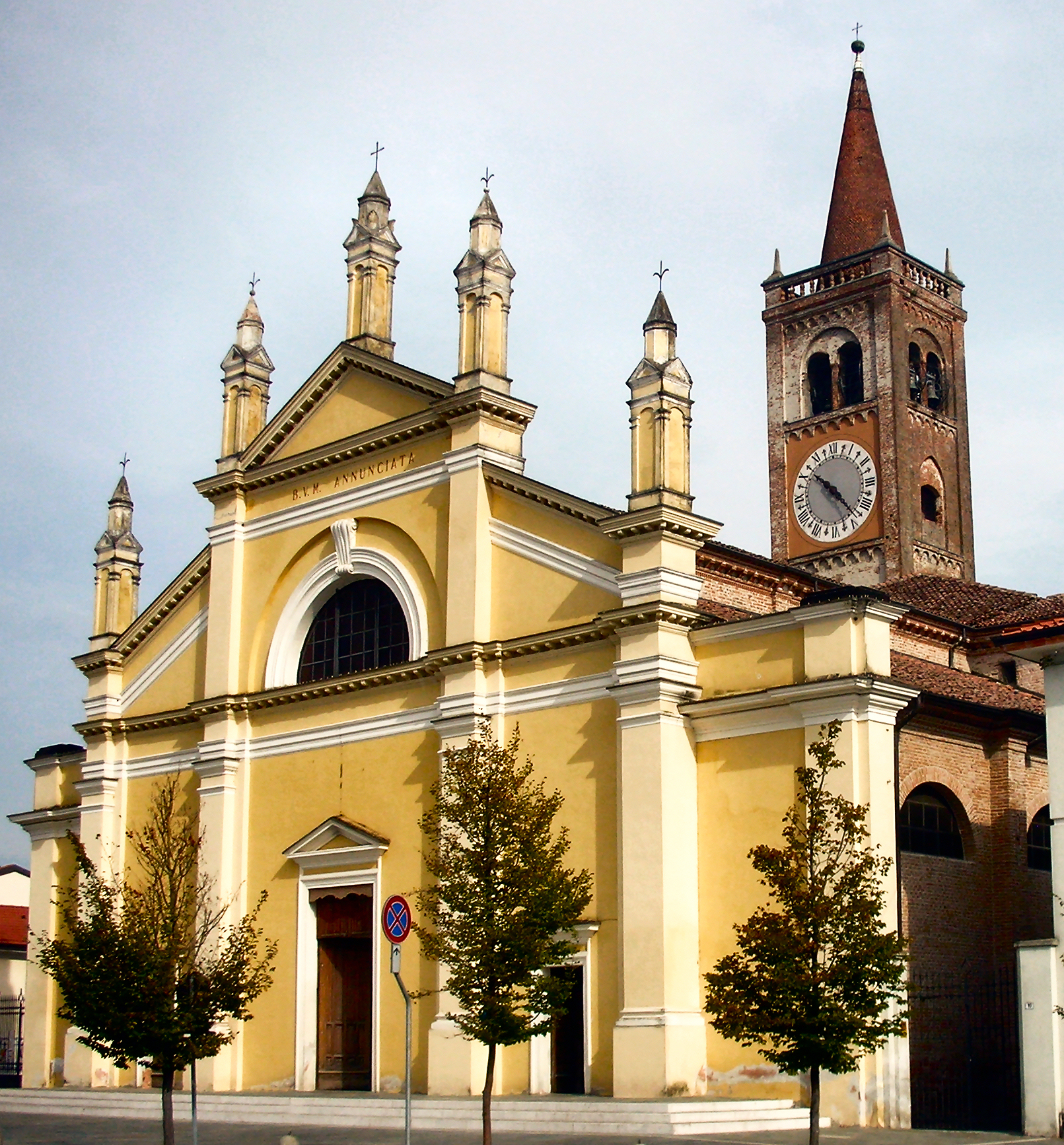 Chiesa Gussola